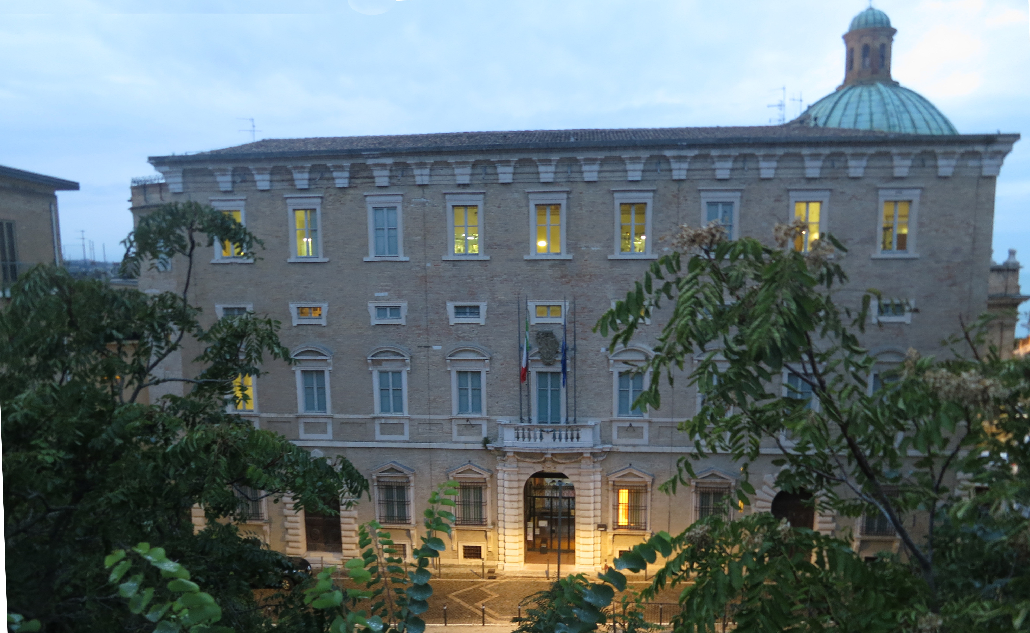 Museo Archeologico Nazionale delle Marche - MIBAC This is a photo of a monument which is part of cultural heritage of Italy.